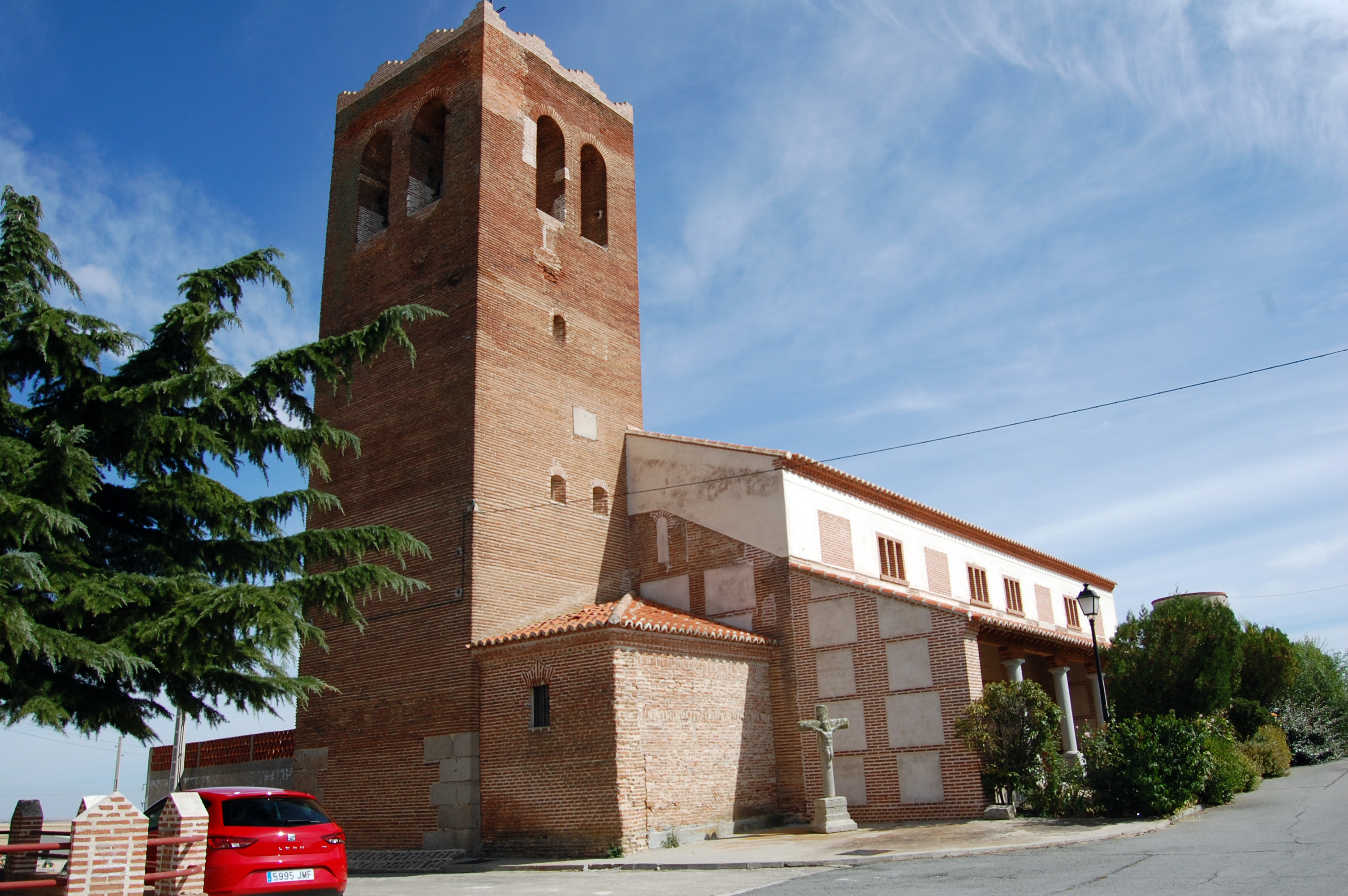 Iglesia de San Cristóbal, Cabezas de Alambre, Ávila